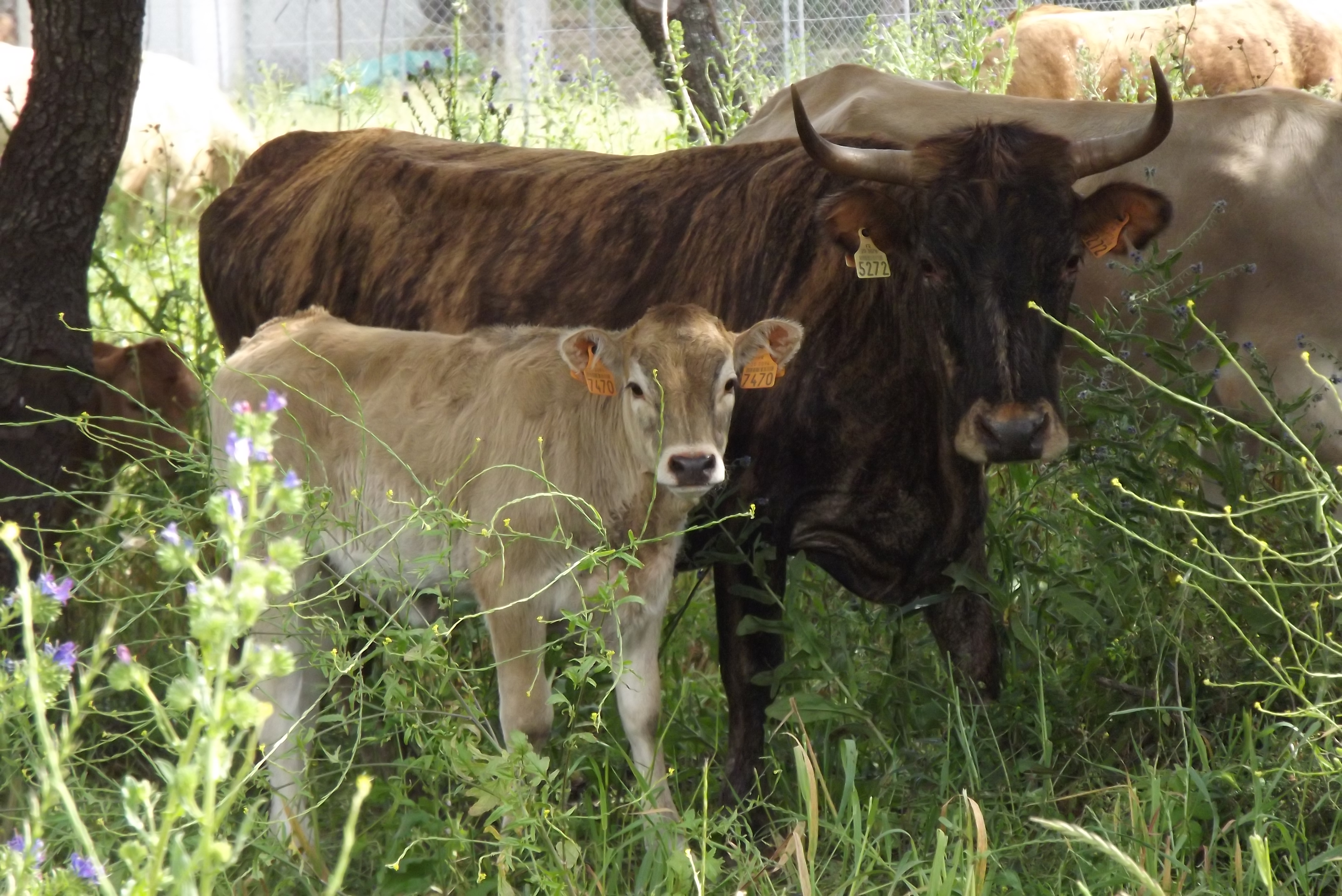 Vache tigre prise en photo sur l'exploitation de J. Abbatucci